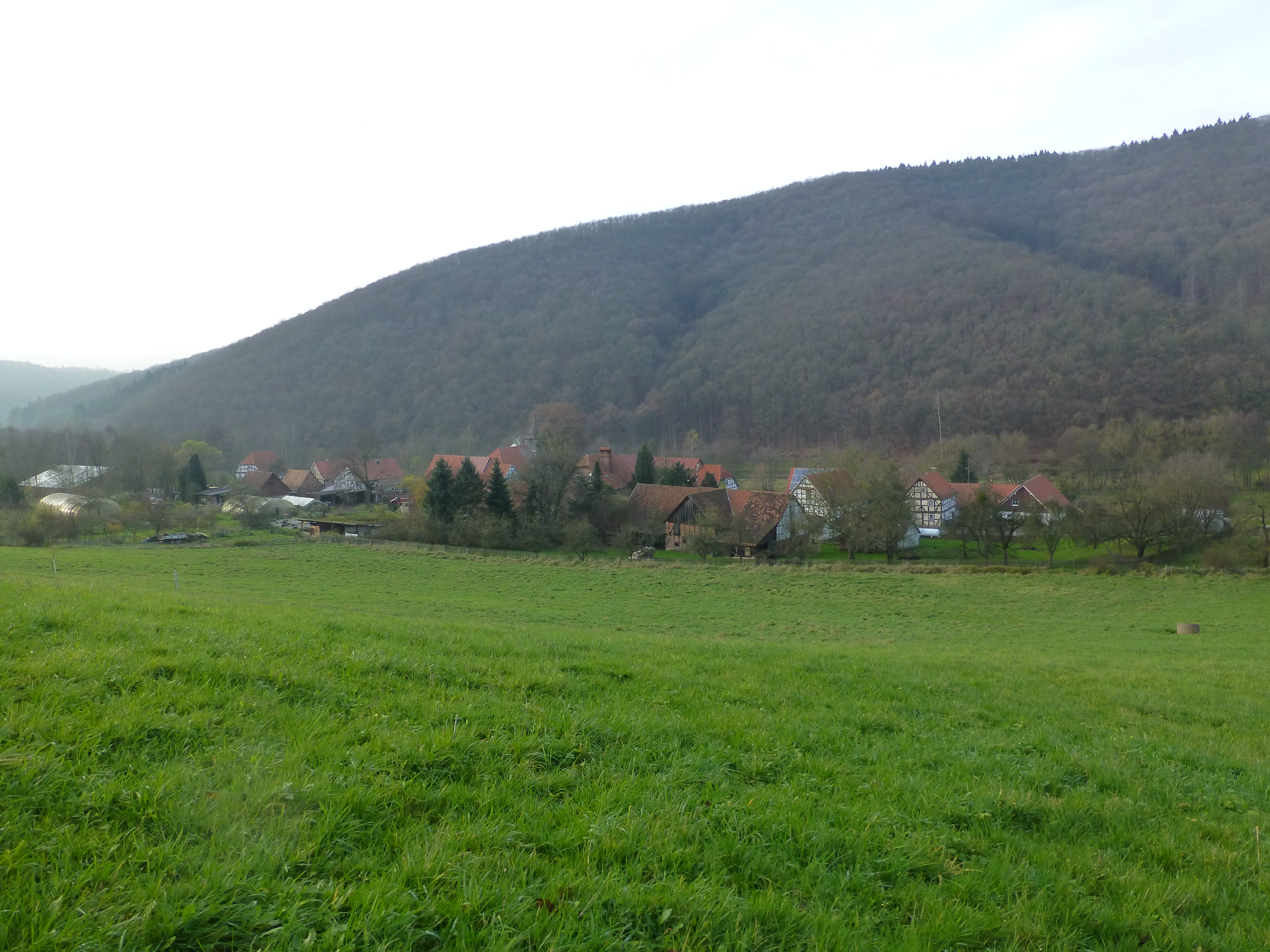 Blick über Dietzenrode